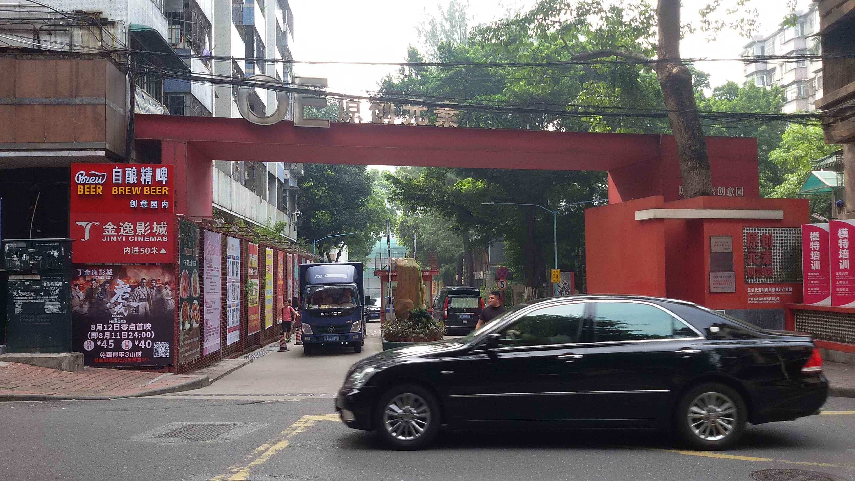 粵語: 原創元素創意園（北門）